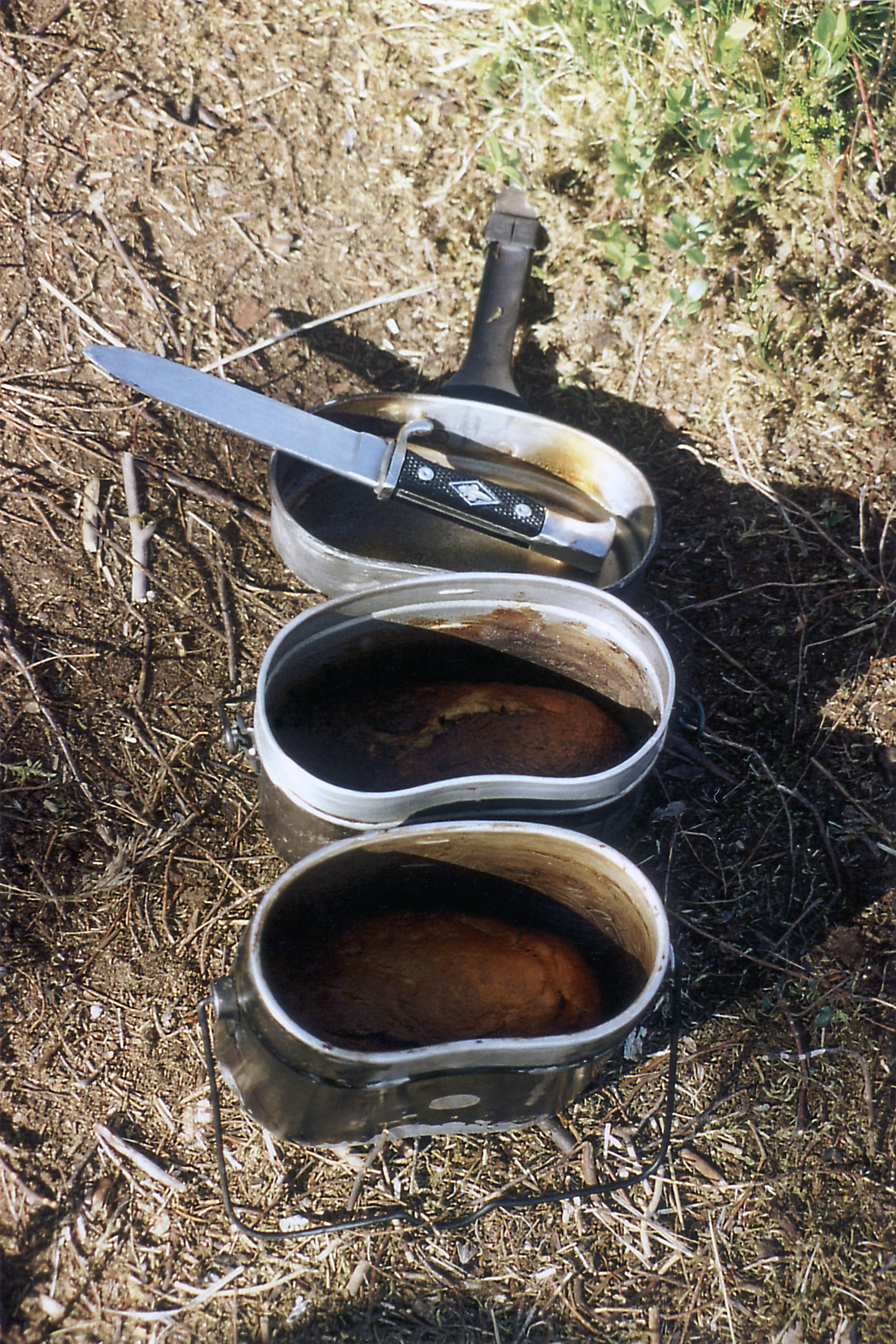 Deutsche Pfadfinder vom Stamm Ägypten-Kloster Schäftlarn (Trupp Penzberg; Katholische Pfadfinderschaft Europas – KPE) während der Nordlandfahrt des Stammes, 29.07. bis 21.08.1994 nach Schweden und Norwegen. Im Bild: In Kochgeschirren („Henkelmännern“) der Bundeswehr und NVA gebackene Rosinenbrötchen am Morgen vor dem Marsch zum Tjaktjajaure.